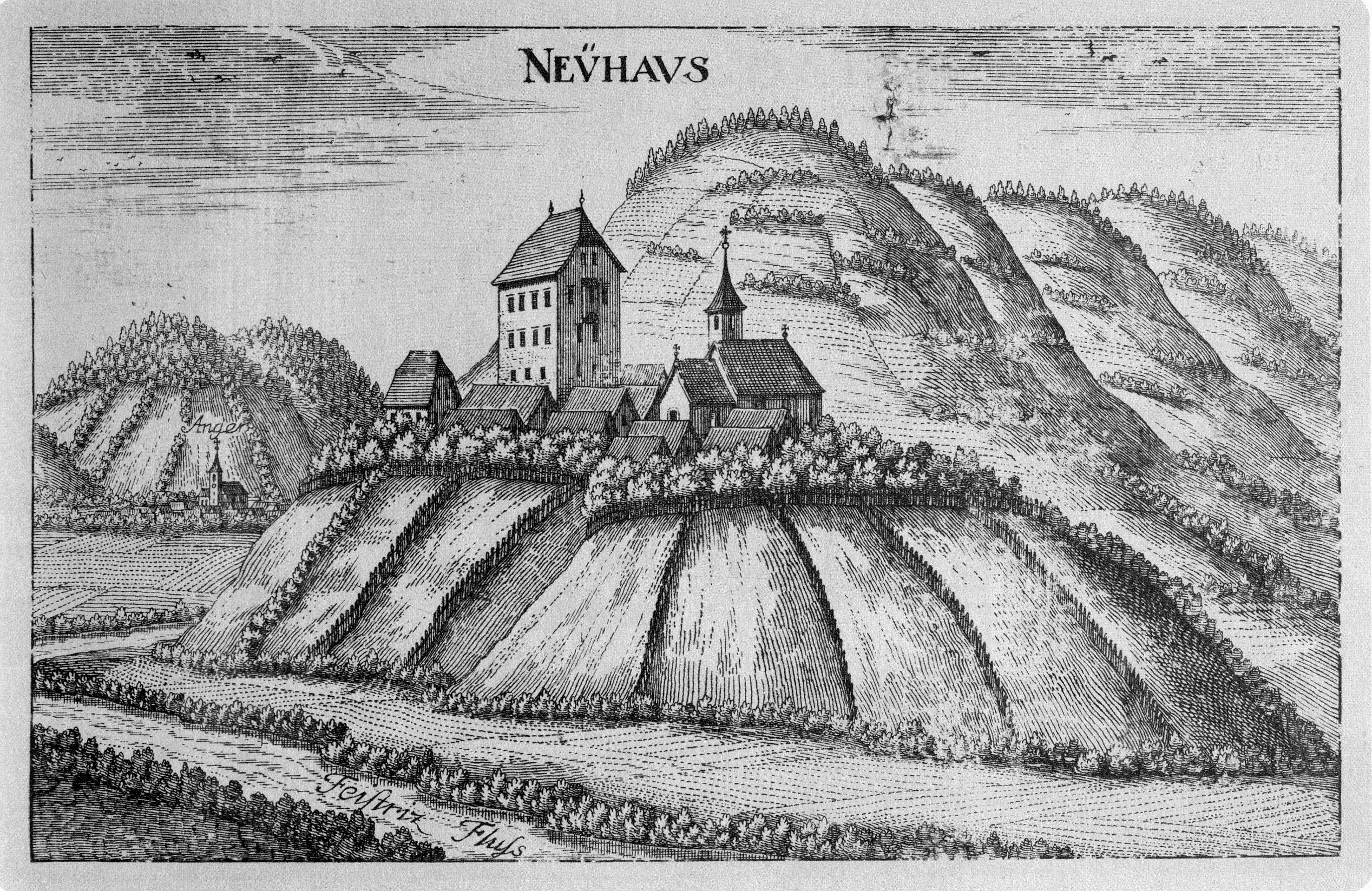 Burg Neuhaus in der Steiermark, Kupferstich; G. M. Vischers Käyserlichen Geographi, Topographia Ducatus Stiriae, Das ist: Eigentliche Delineation / und Abbildung aller Städte / Schlösser / Marcktfleck / Lustgärten / Probsteyen / Stiffter / Clöster und Kirchen / so es sich im Herzogthumb Steyrmarck befinden; Und anjetzo Umb einen billichen Preyß zu finden seynd Bey Johann Bitsch Universitäts Buchhandlern / Auff dem Juden=Platz bey der guldenen Saulen. Graz 1681 Die Nummerierung der Dateien folgt der alphabetischen Reihung der Ortsnamen